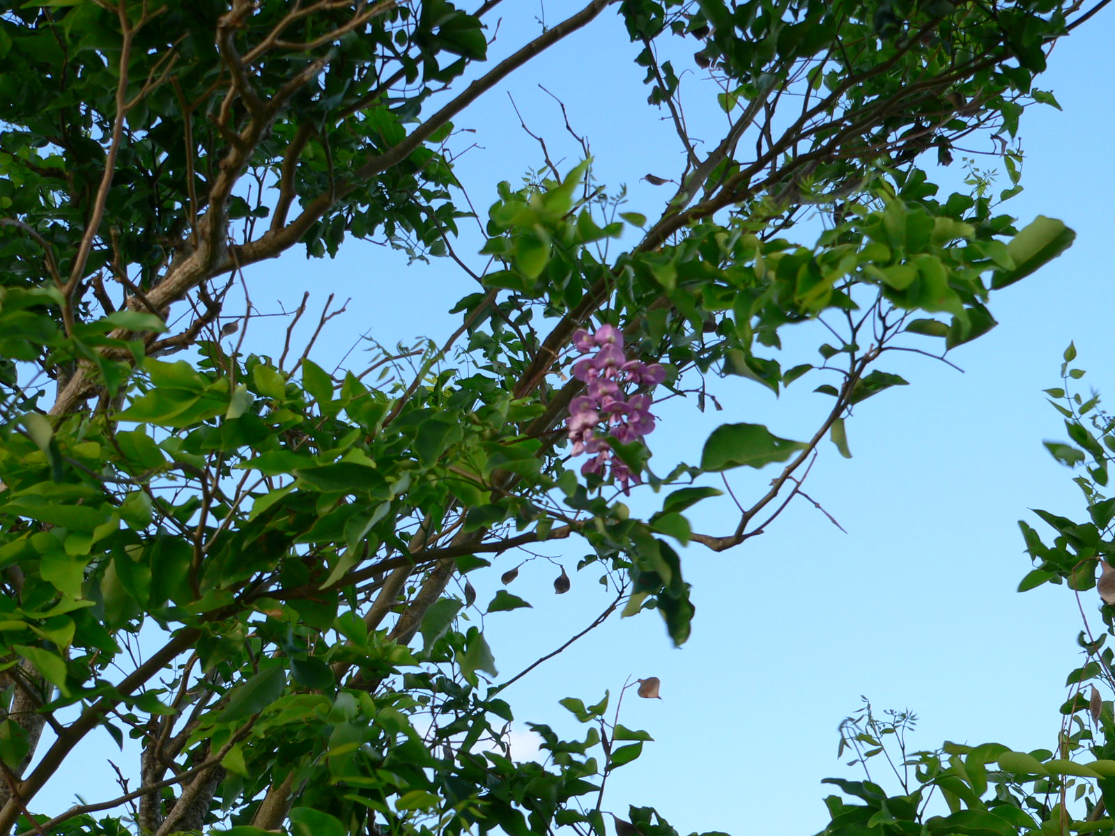 Lonchocarpus punctatus Kunth, Guadeloupe